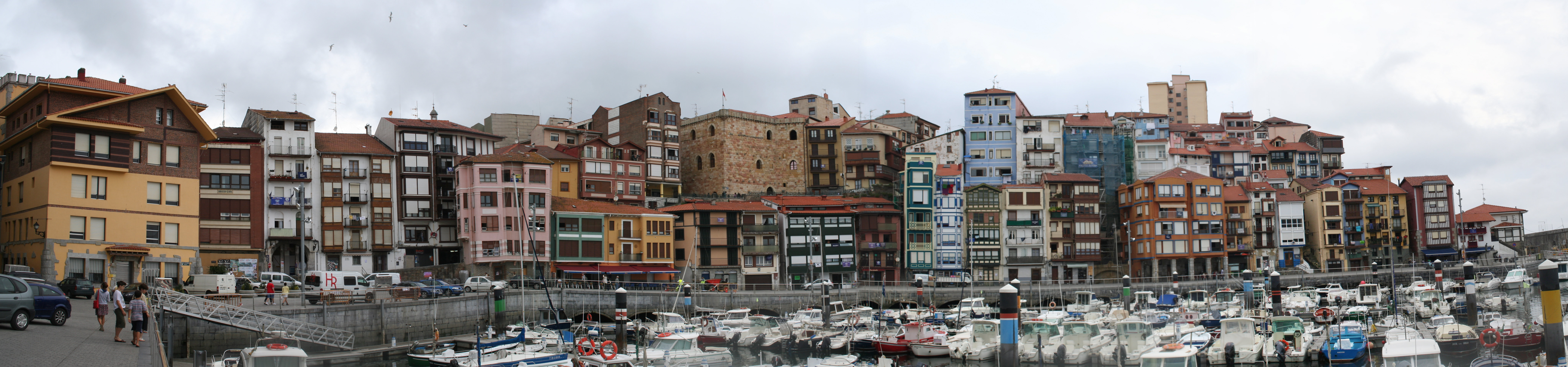 Panorama di Bermeo